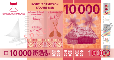 Billet en francs Pacifique (série de 2014)